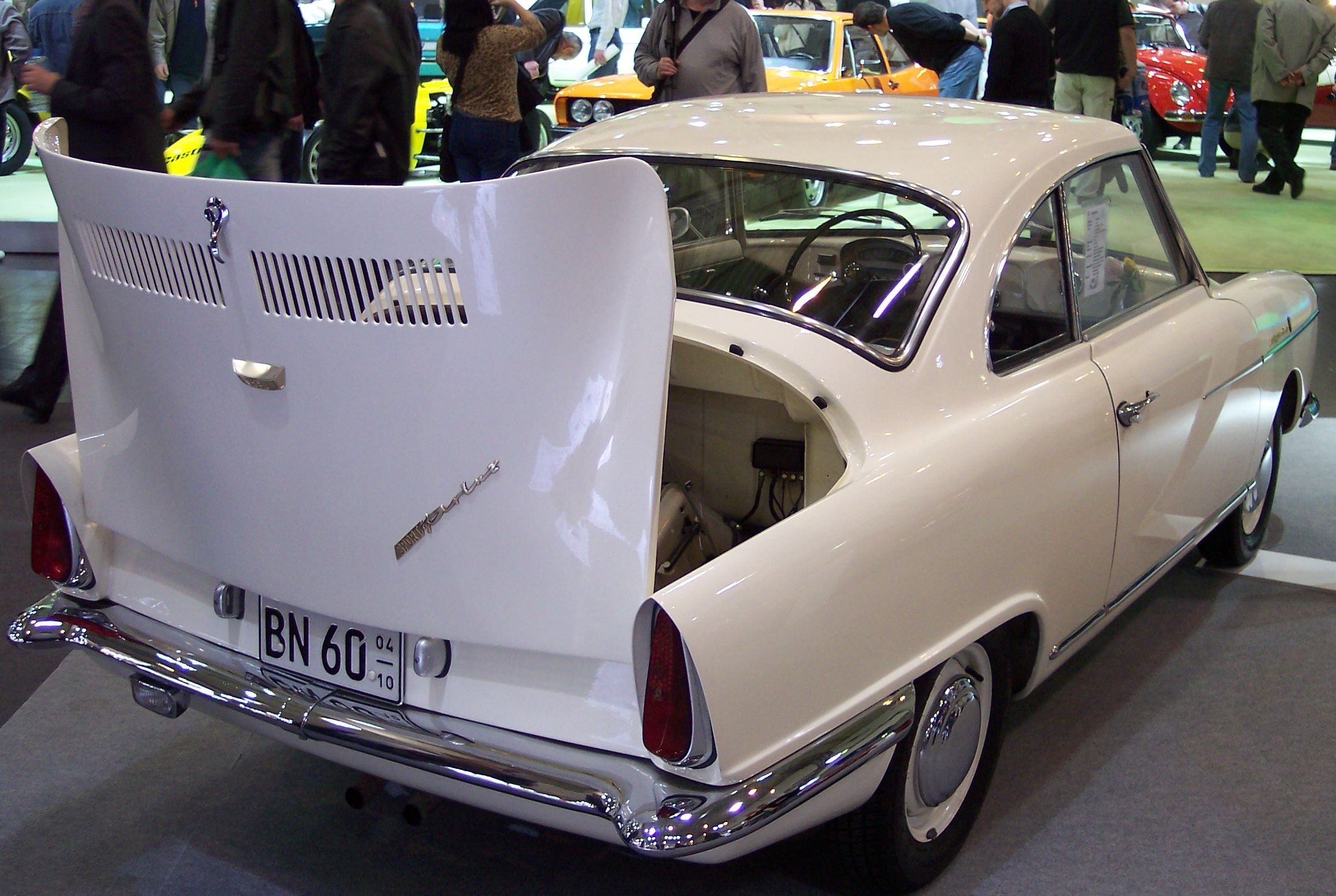 NSU Sportprinz